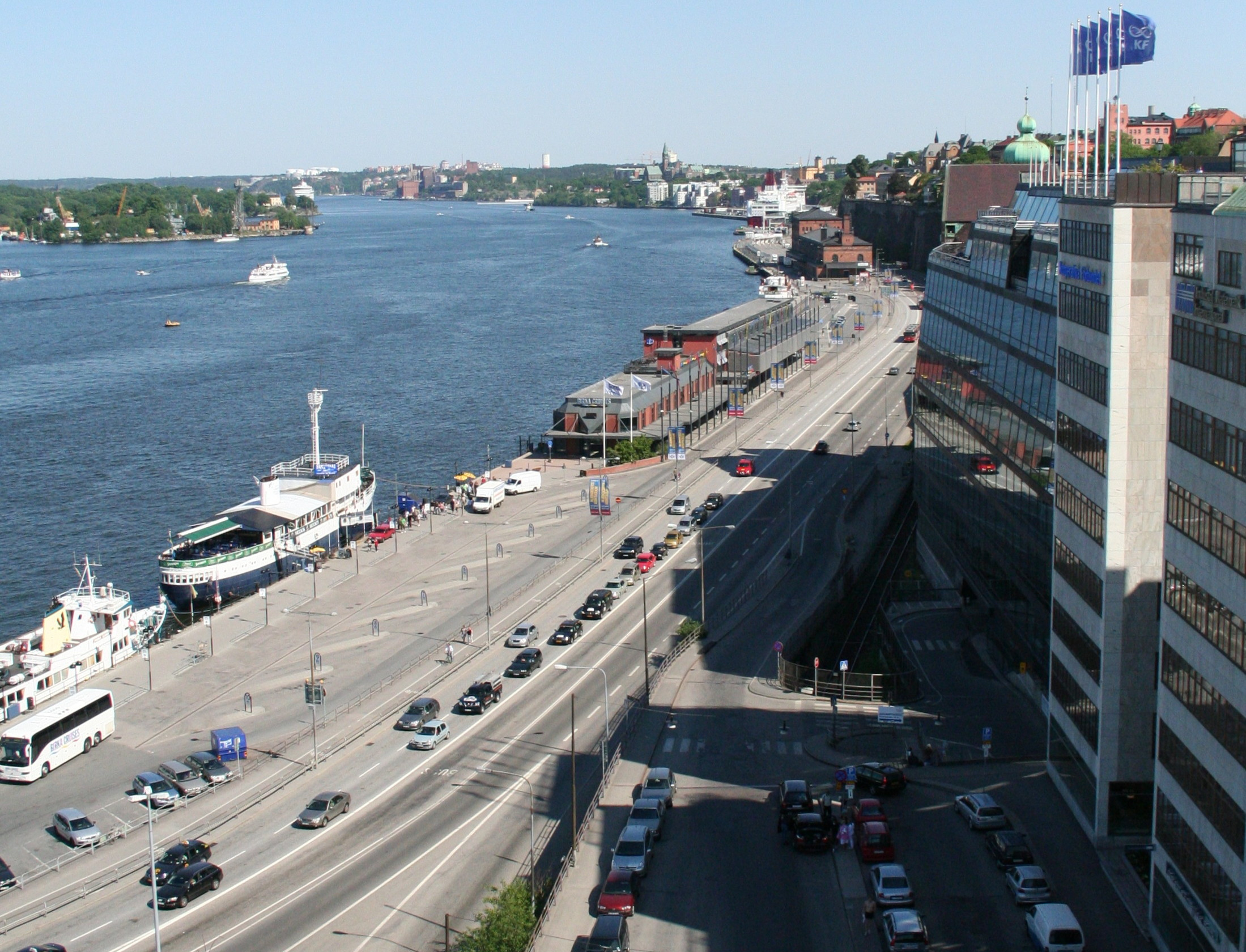 Saltsjön och Stadsgården med Tullhuset och Birkaterminalen, sett från Katarinahissen, Stockholm 8 juni 2007.